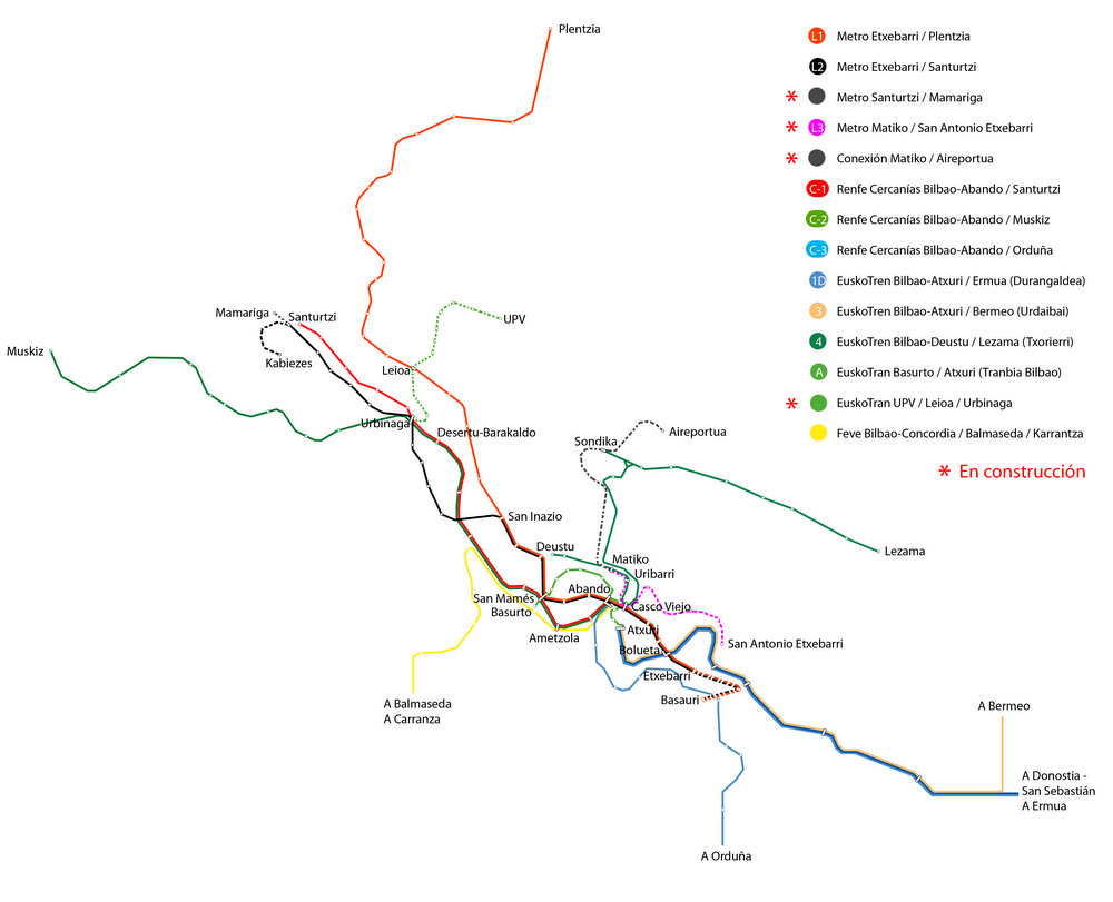 Mapa de red de todas las líneas de Cercanías de Bilbao.